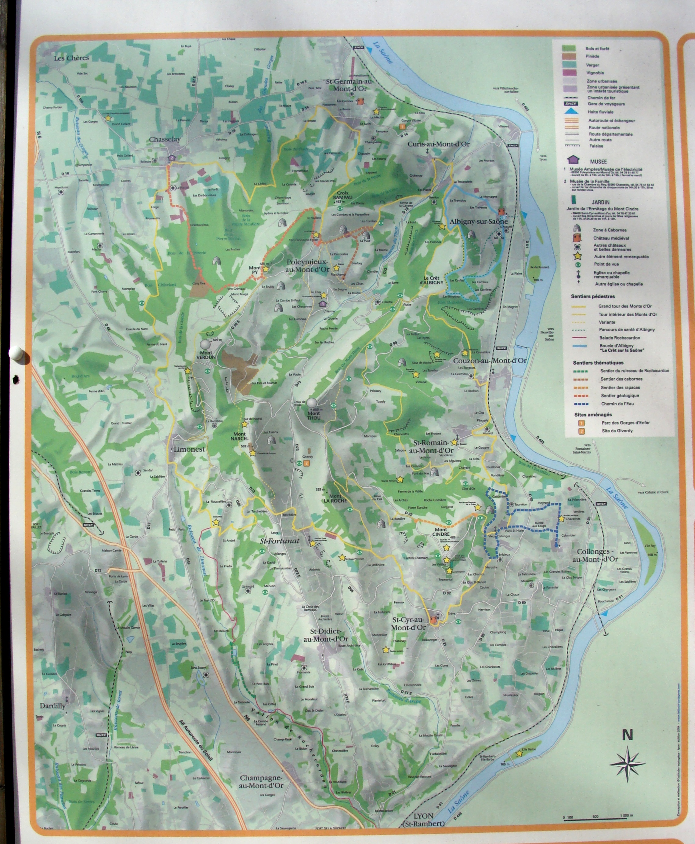 Carte du massif des Monts d'Or (à Albigny, sur la place)